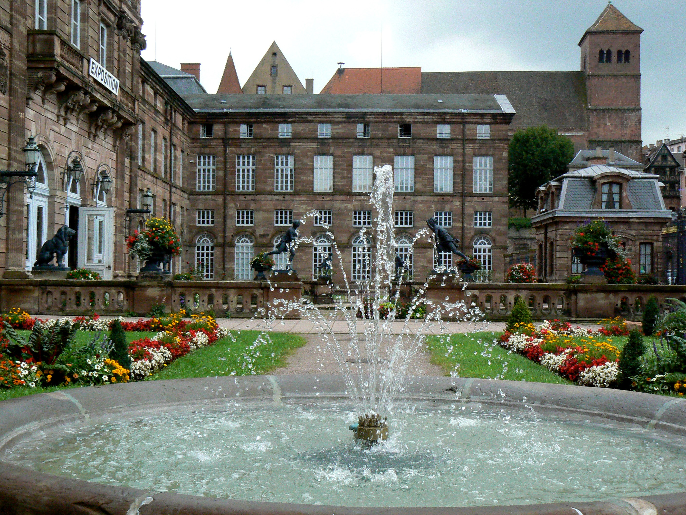 Façade du château des Rohan de Saverne